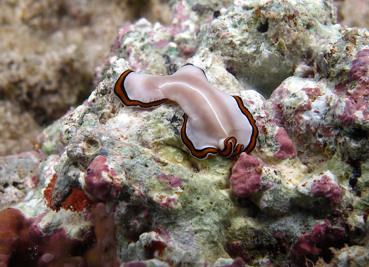 Un ver plat à marge orange et noire (Pseudoceros confusus) à la Réunion.